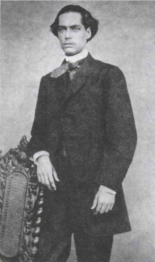 Castro Alves aos dezoito anos de idade.